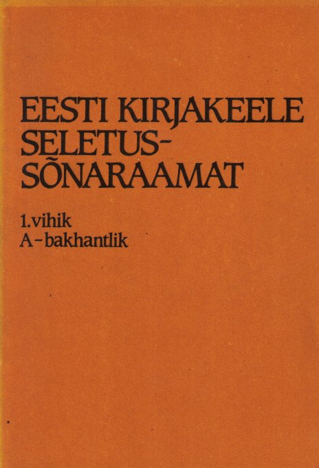 Description